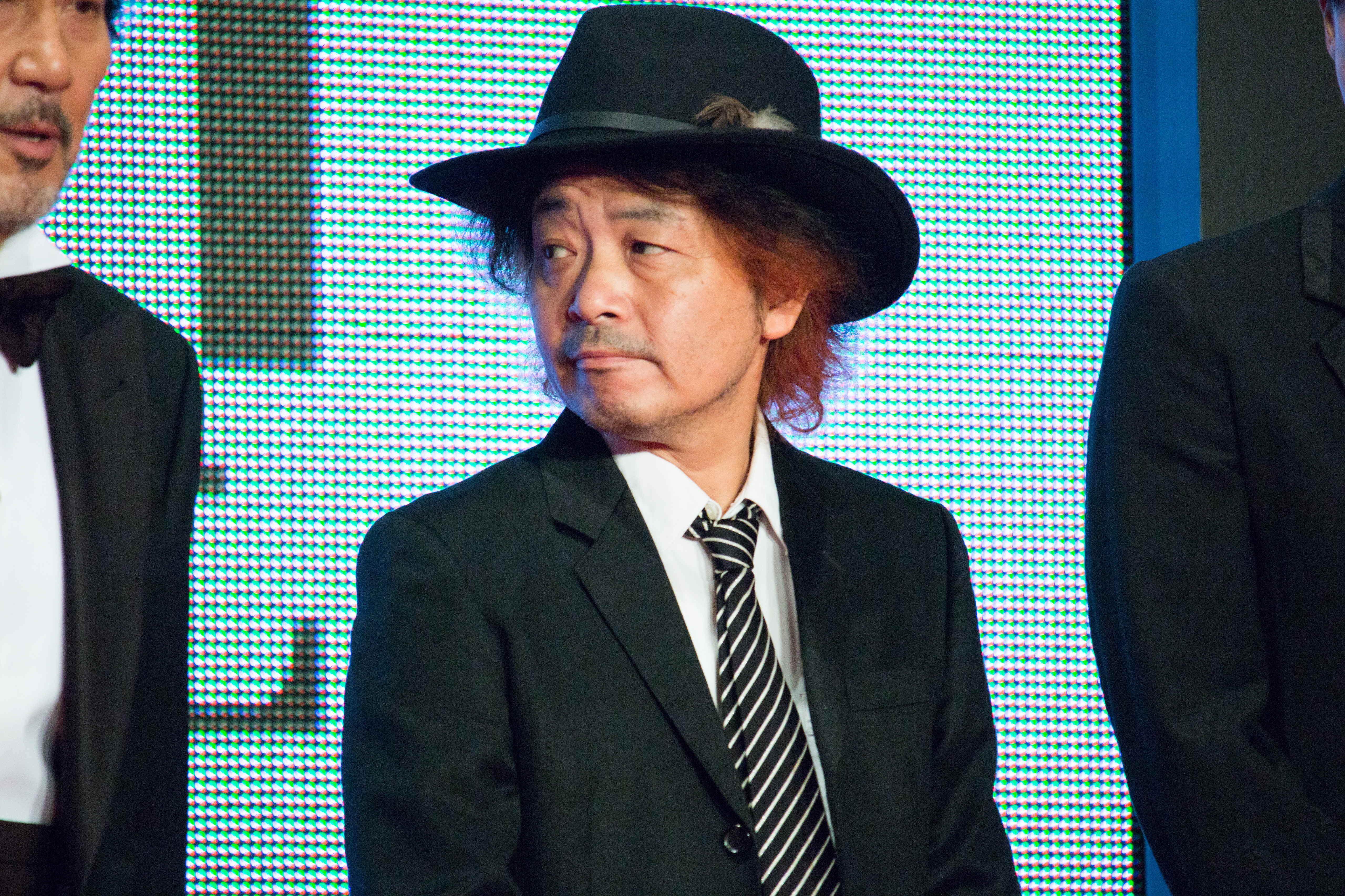 第28回 東京国際映画祭 オープニングセレモニー 園子温 (ラブ&ピース)